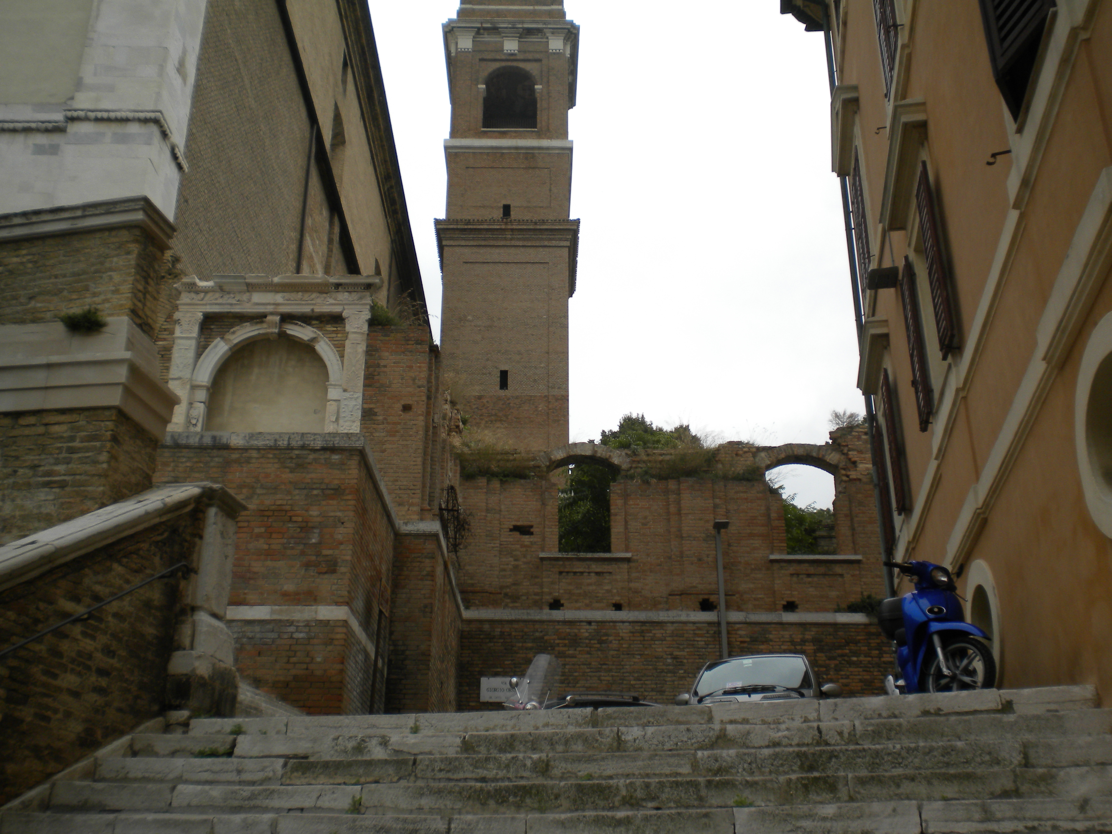 Convento di San Francesco alle Scale This is a photo of a monument which is part of cultural heritage of Italy.